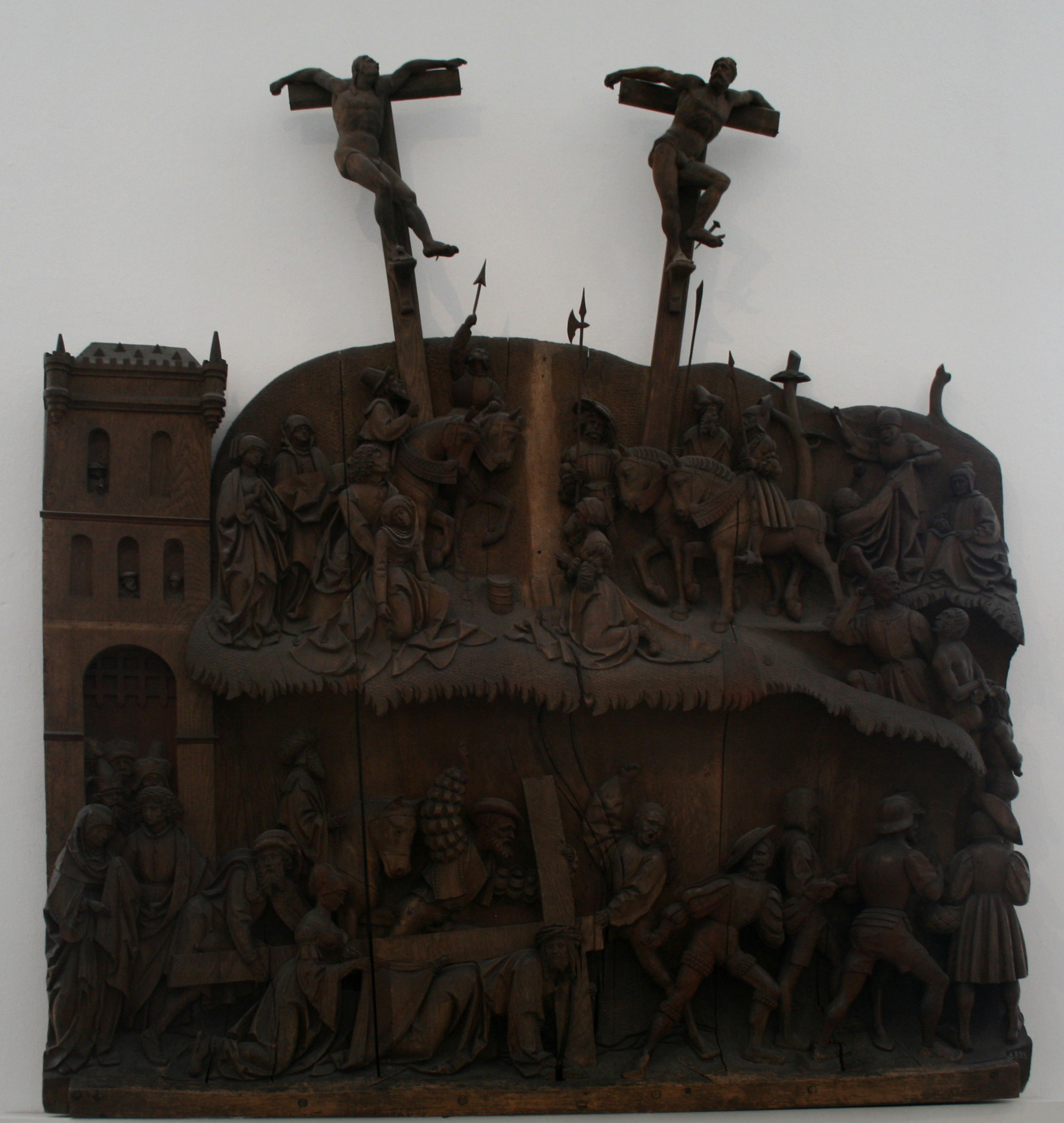 Der sogenannte kleine Brüggemannaltar befand sich bis 1897 in der St. Johanniskirche in Brügge (Holstein)